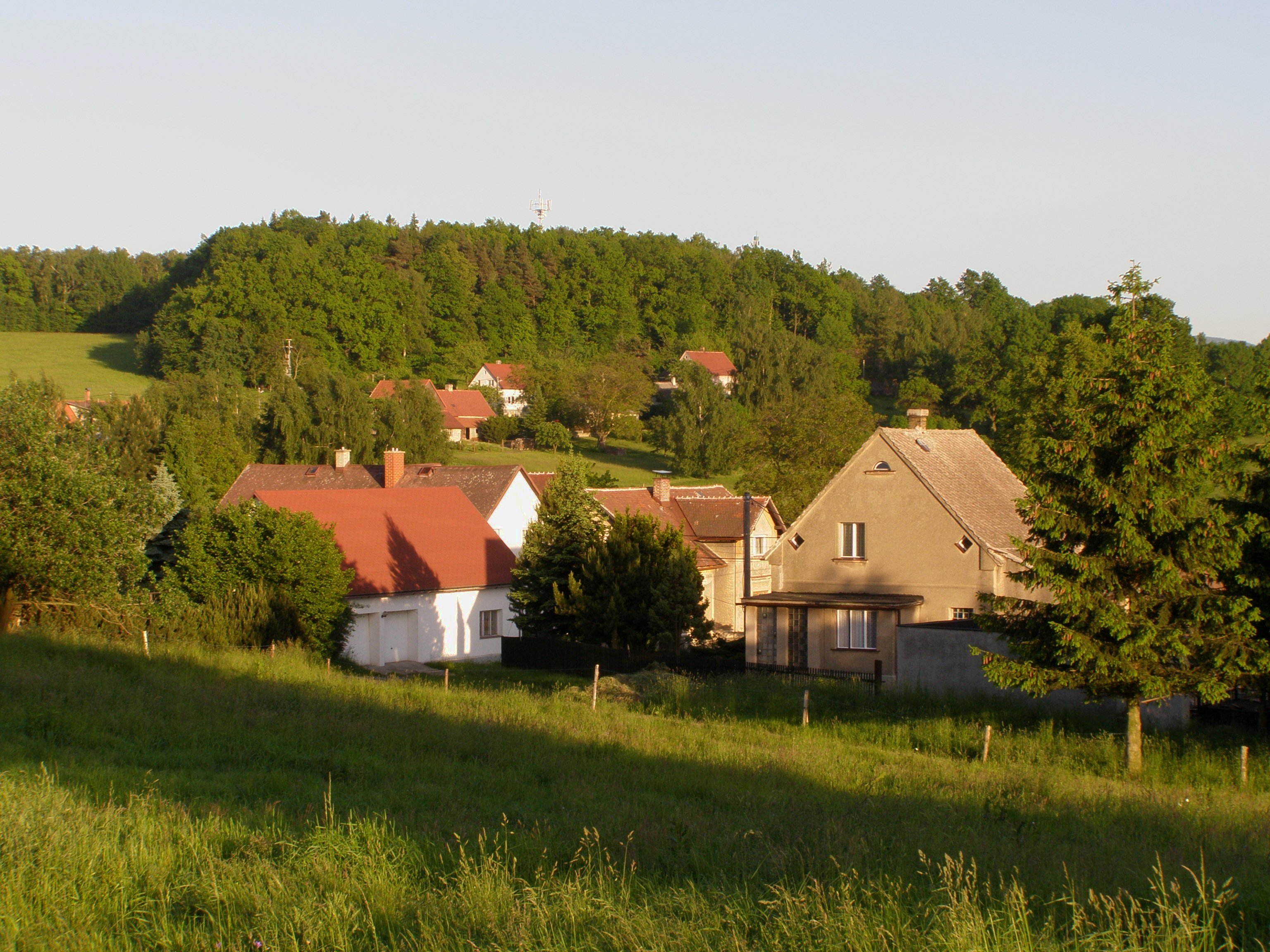 Česky: Frýdlant, ulice Údolí, v pozadí vrchol U Rozhledny (399 m)